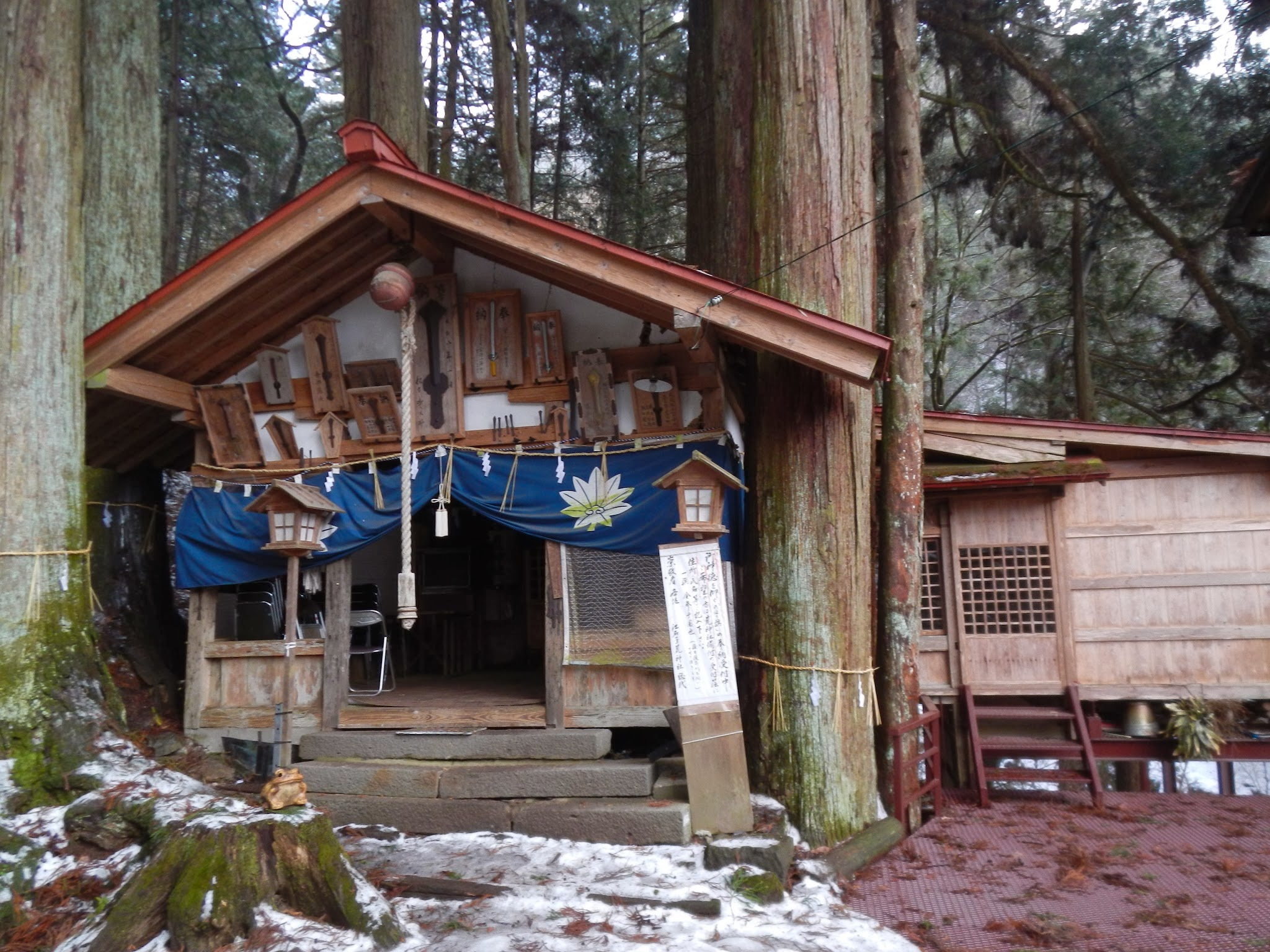 Enakomachi, Takayama, Gifu Prefecture 506-0818, Japan